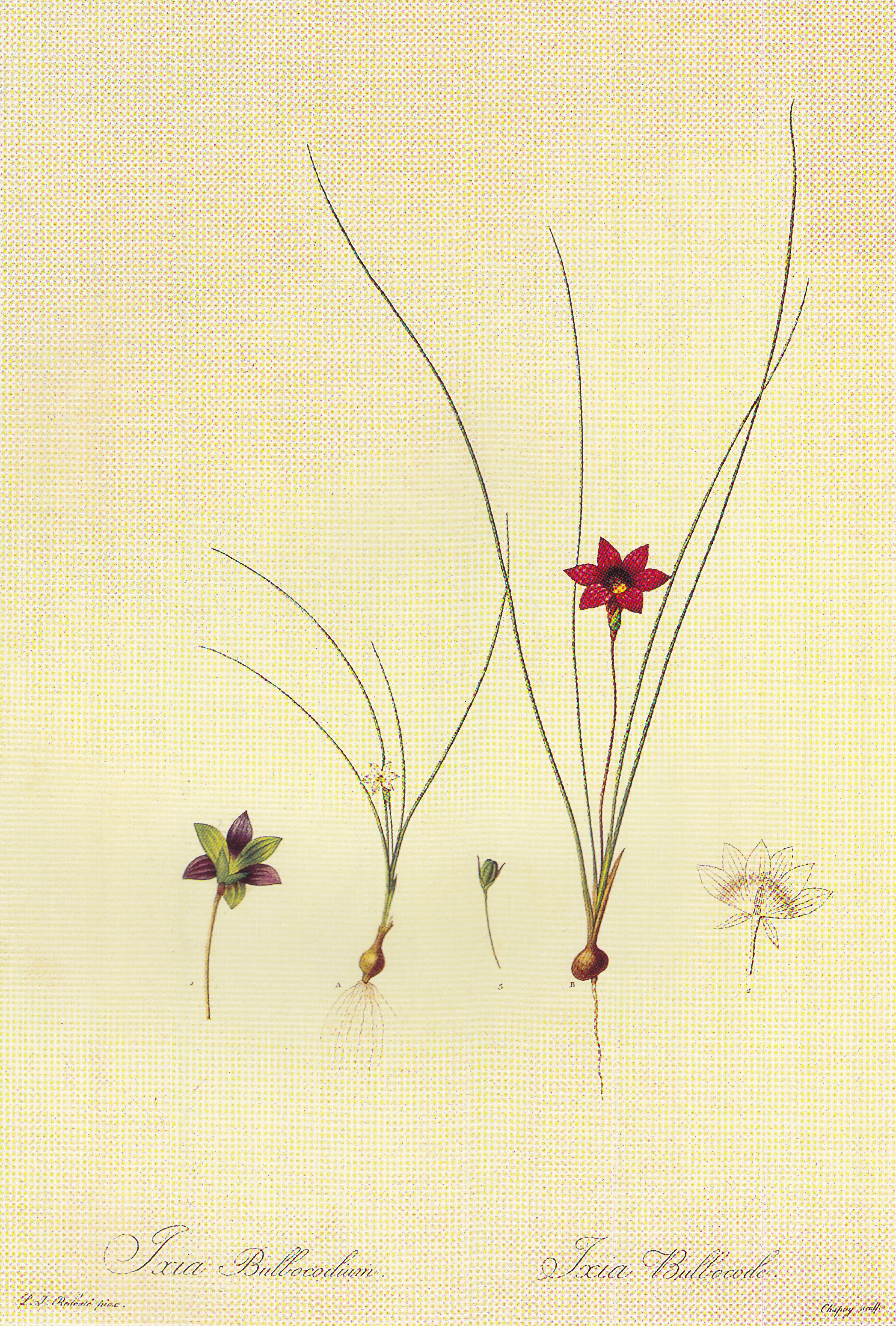 罗谬卢斯。原产于沿地中海地区。